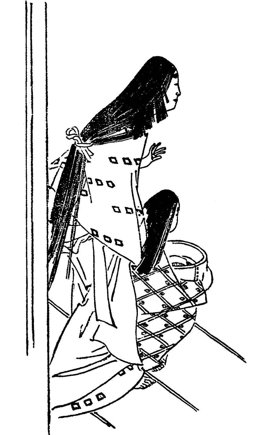 千手前（千寿）。鎌倉幕府女房、平安時代末期の人物。／明治時代『前賢故実』より。画：菊池容斎